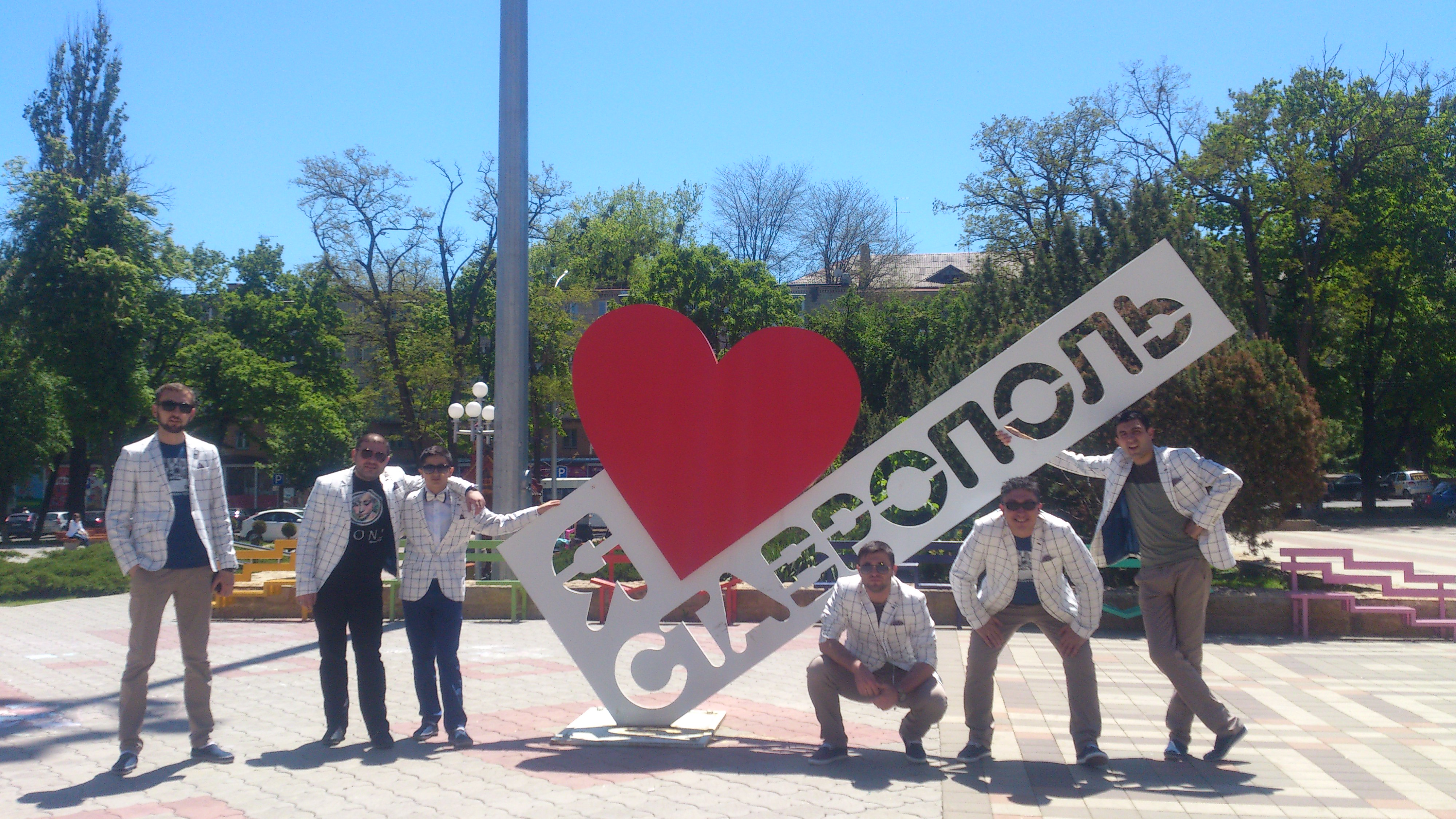 Сборная Арцаха КВН